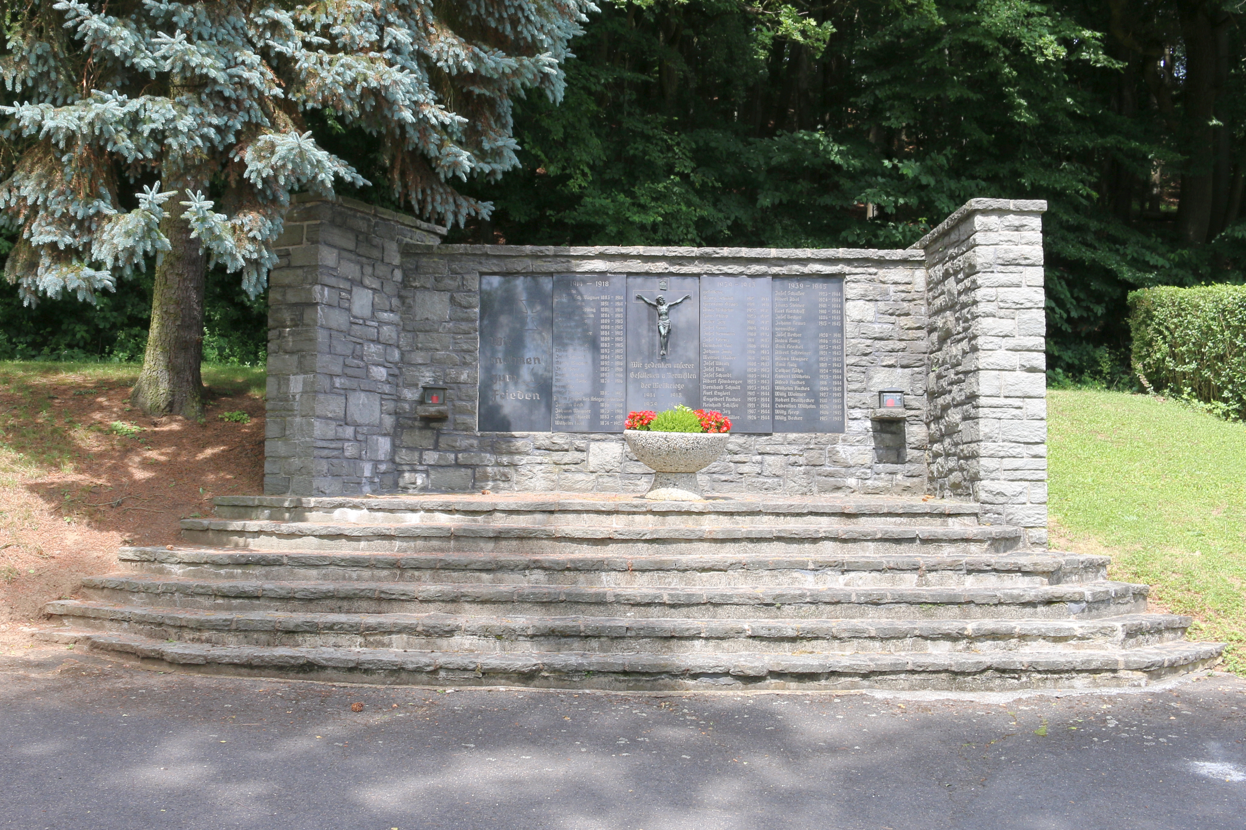 Waldbrunn (Westerwald) - Fussingen: Ehrenmal für die Gefallenen des I. und II. Weltkrieg